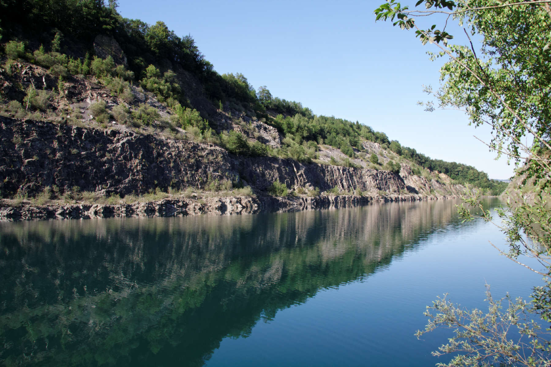 See an der Südseite des Langen Köchels im Murnauer Moos